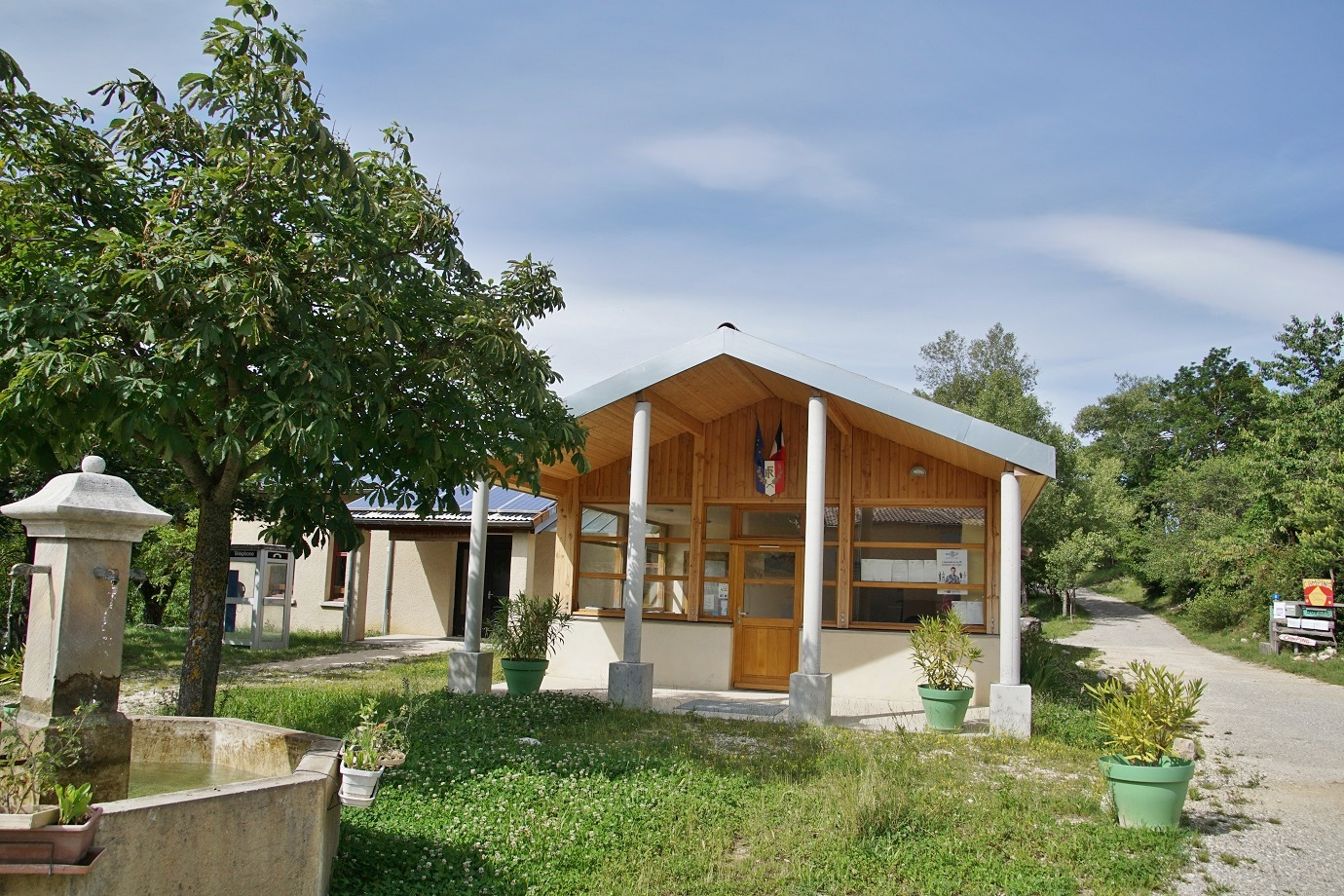 département de la Drôme